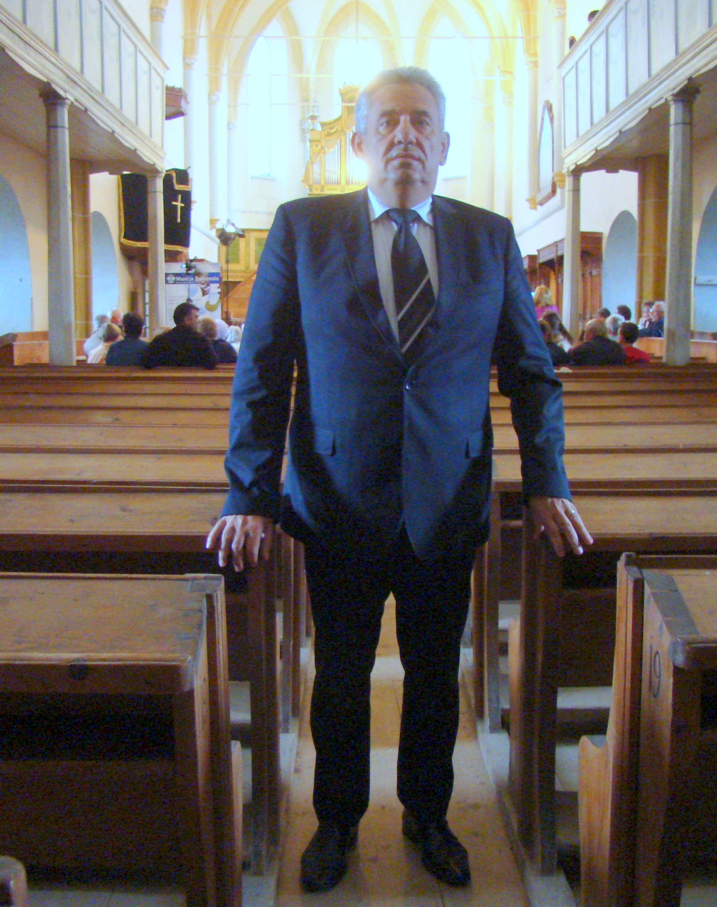 Primarul comunei Feldioara Sorin Tăuş